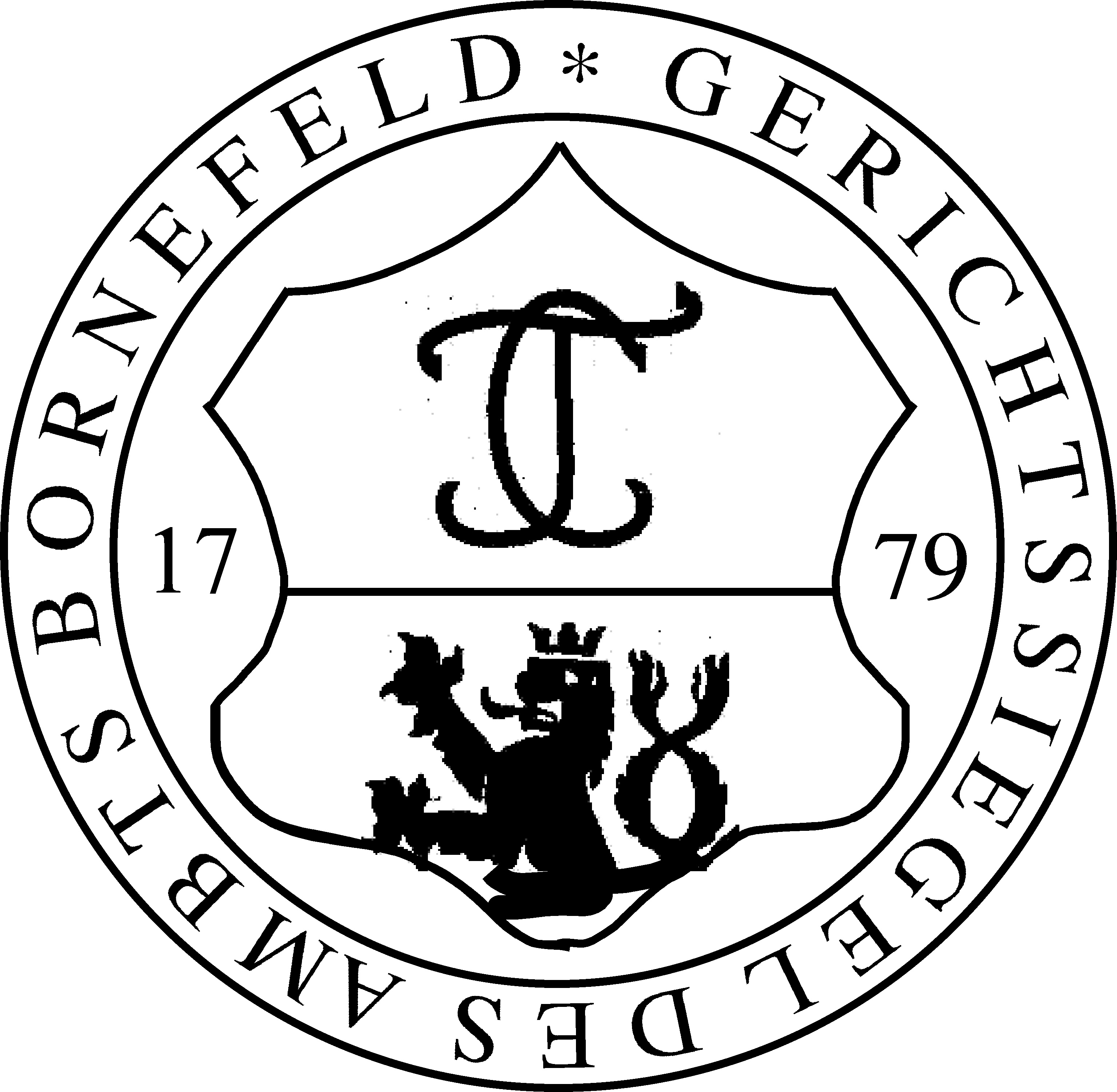 Gerichtssiegel des Amts Bornefeld von 1779